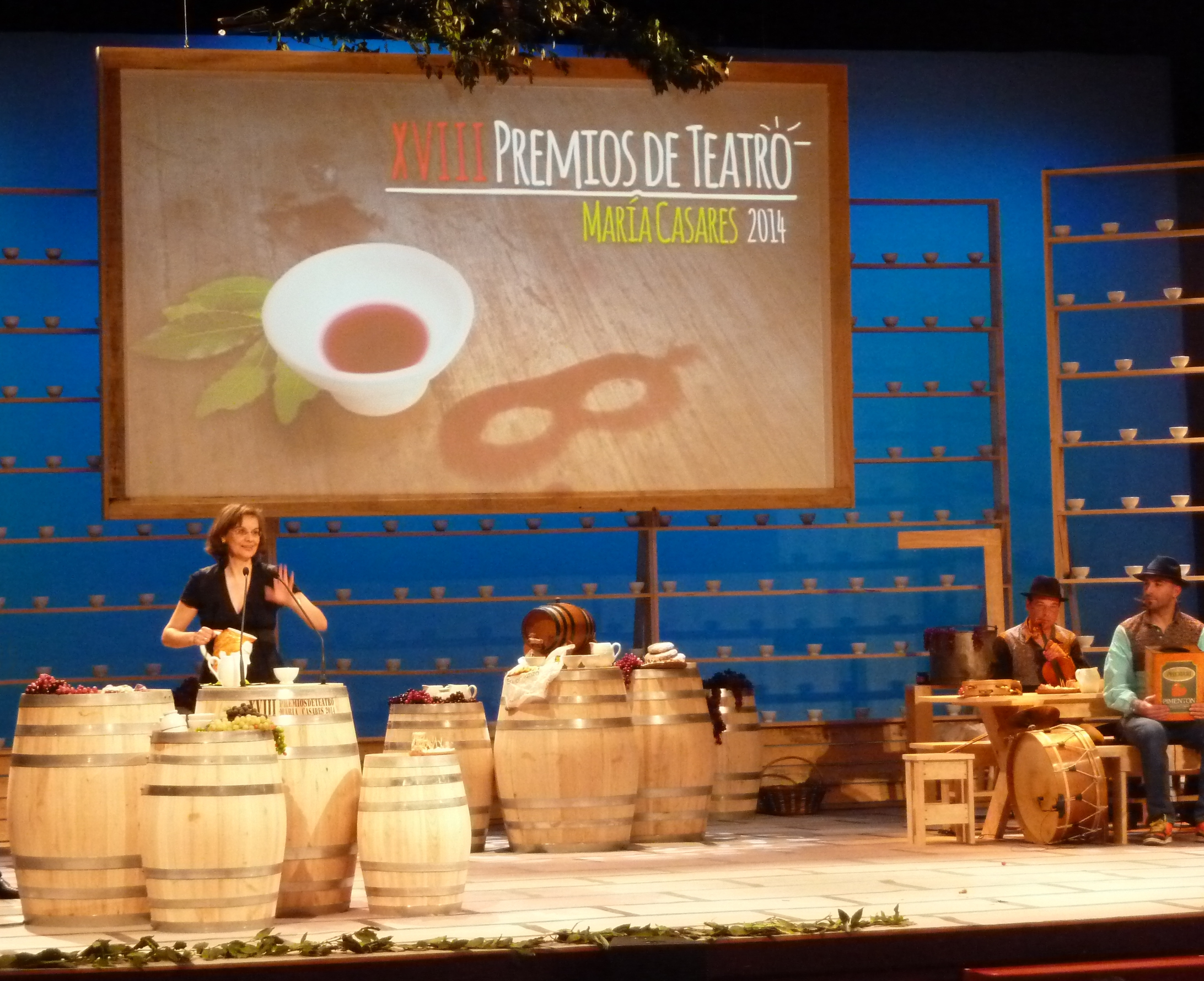 Cristina Domínguez e os músicos do grupo "Radio Cos" na gala dos premios María Casares 2014.